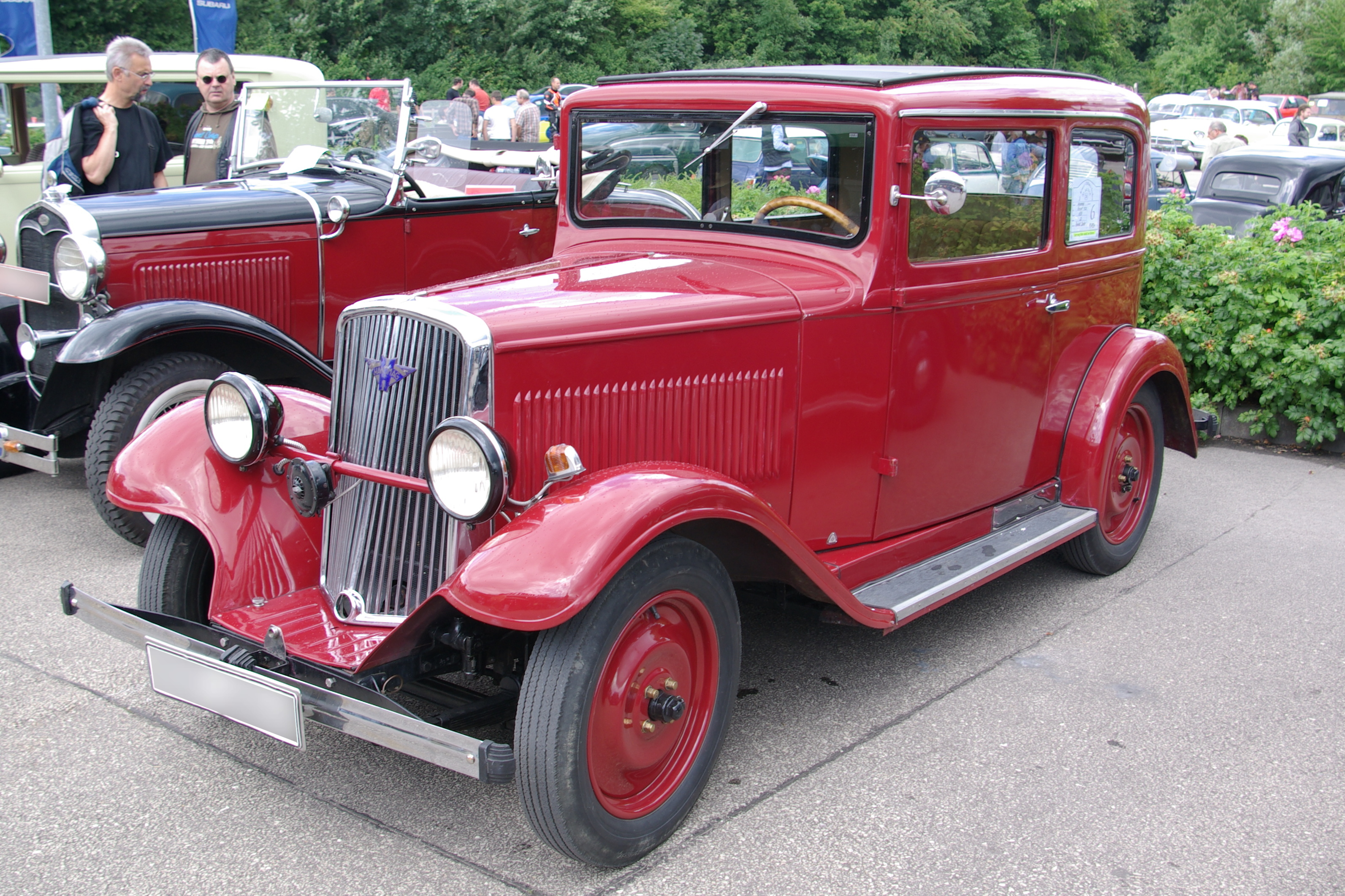 Hanomag 4/23 Baujahr 1933 Leistung 23 PS